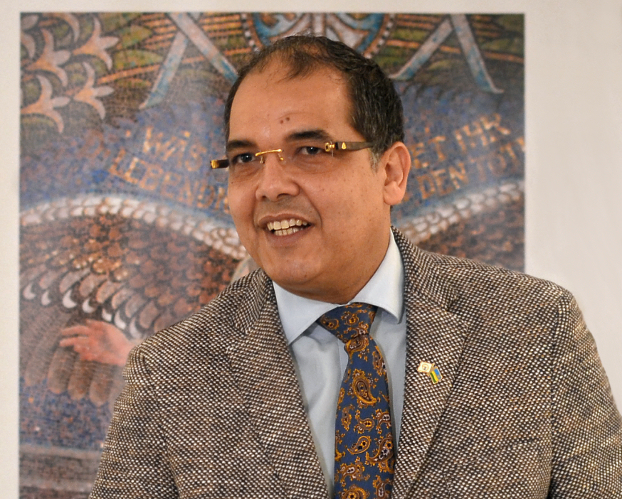 Igor Cesar, Botschafter von Ruanda in Deutschland